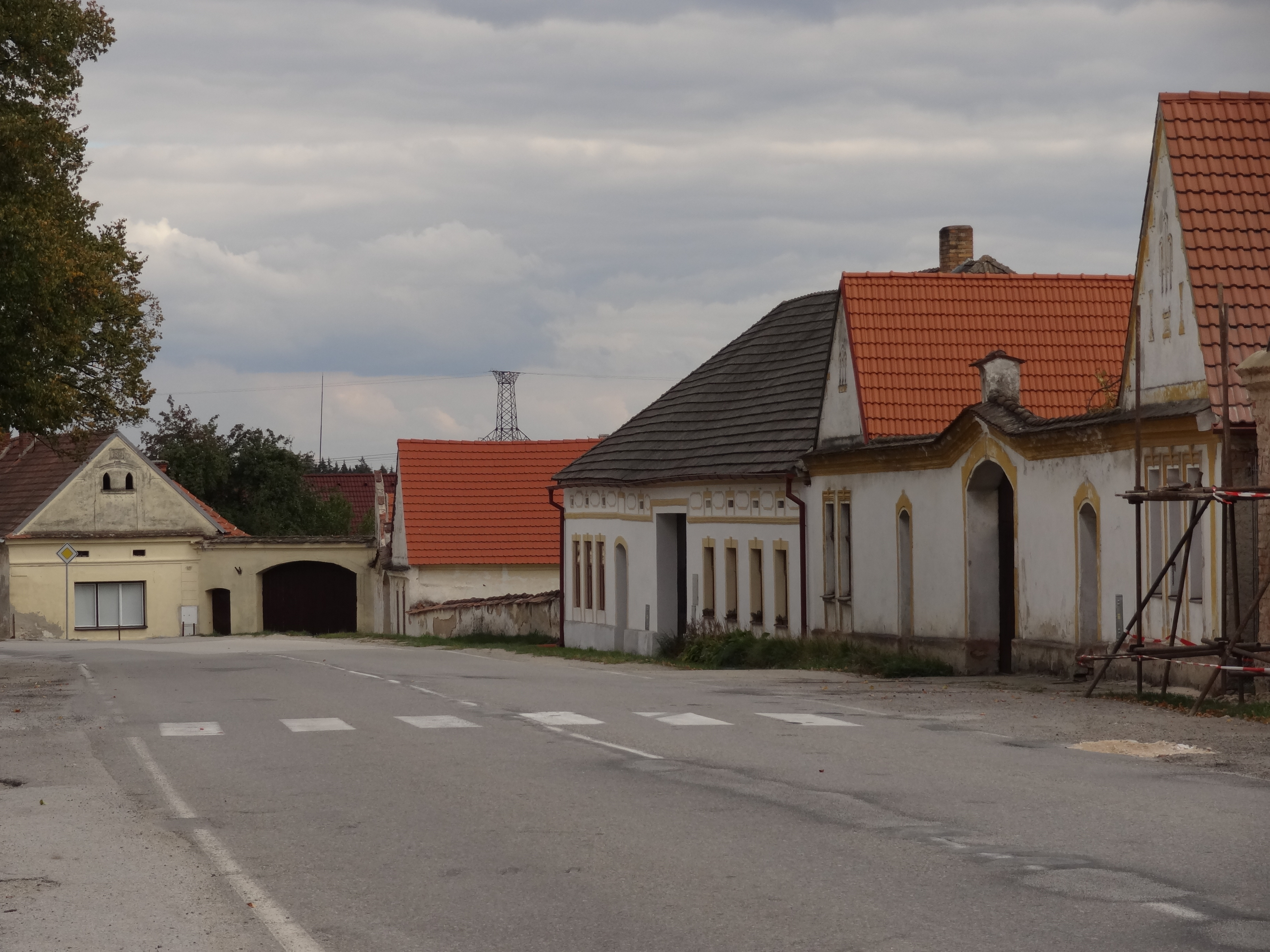 Vitín - náves: statky čp. 1, 2, 3 a 4 (zleva)